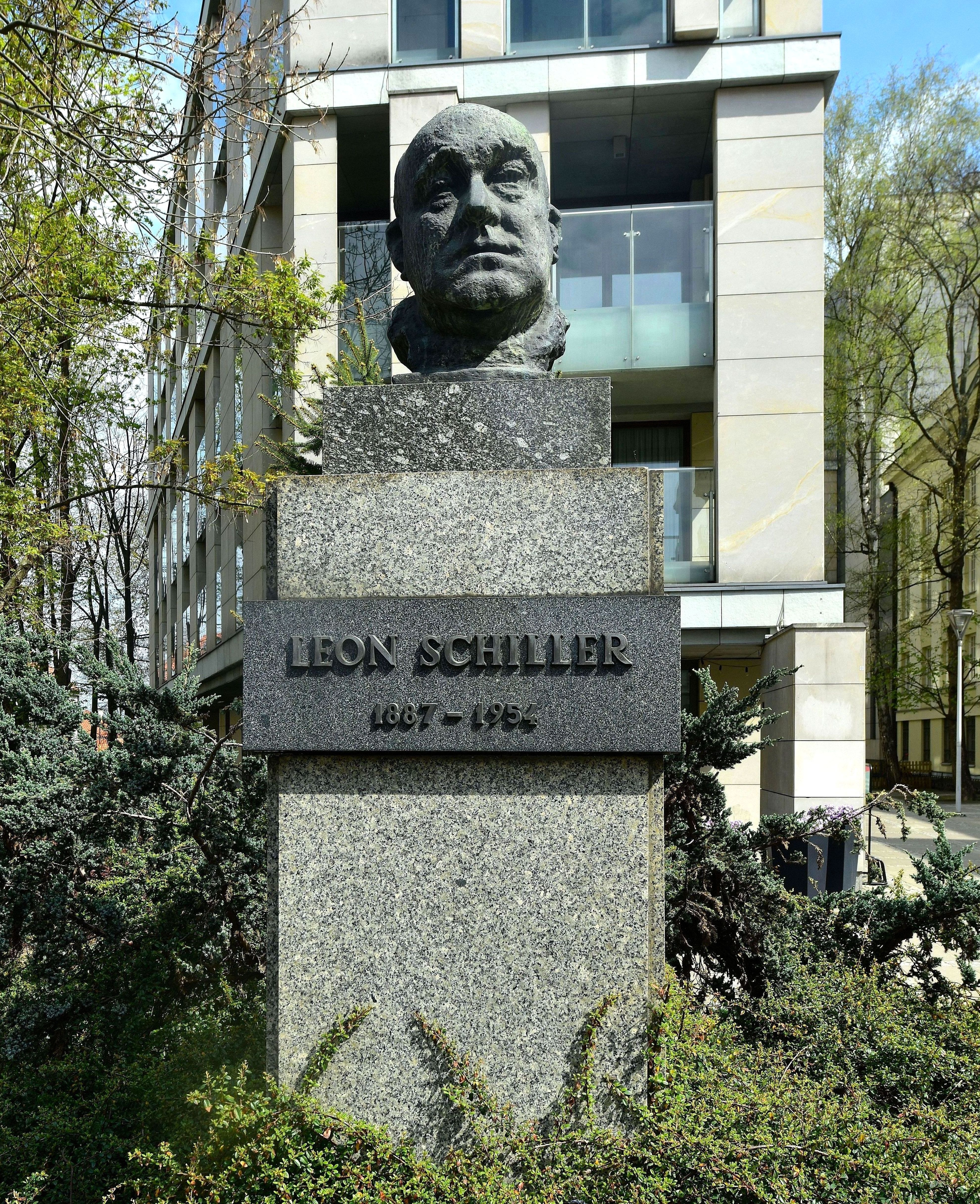 Pomnik Leona Schillera przy ul. Karasia róg ul. Oboźnej w Warszawie